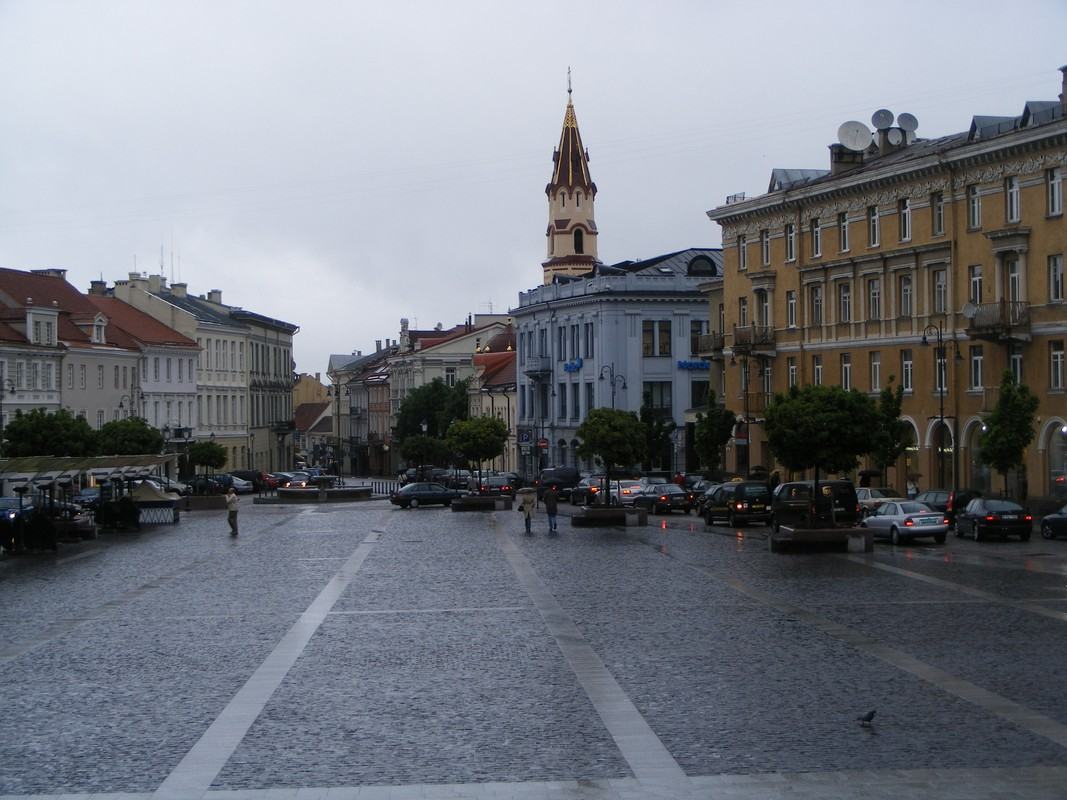 RYNEK STAREGO MIASTA.